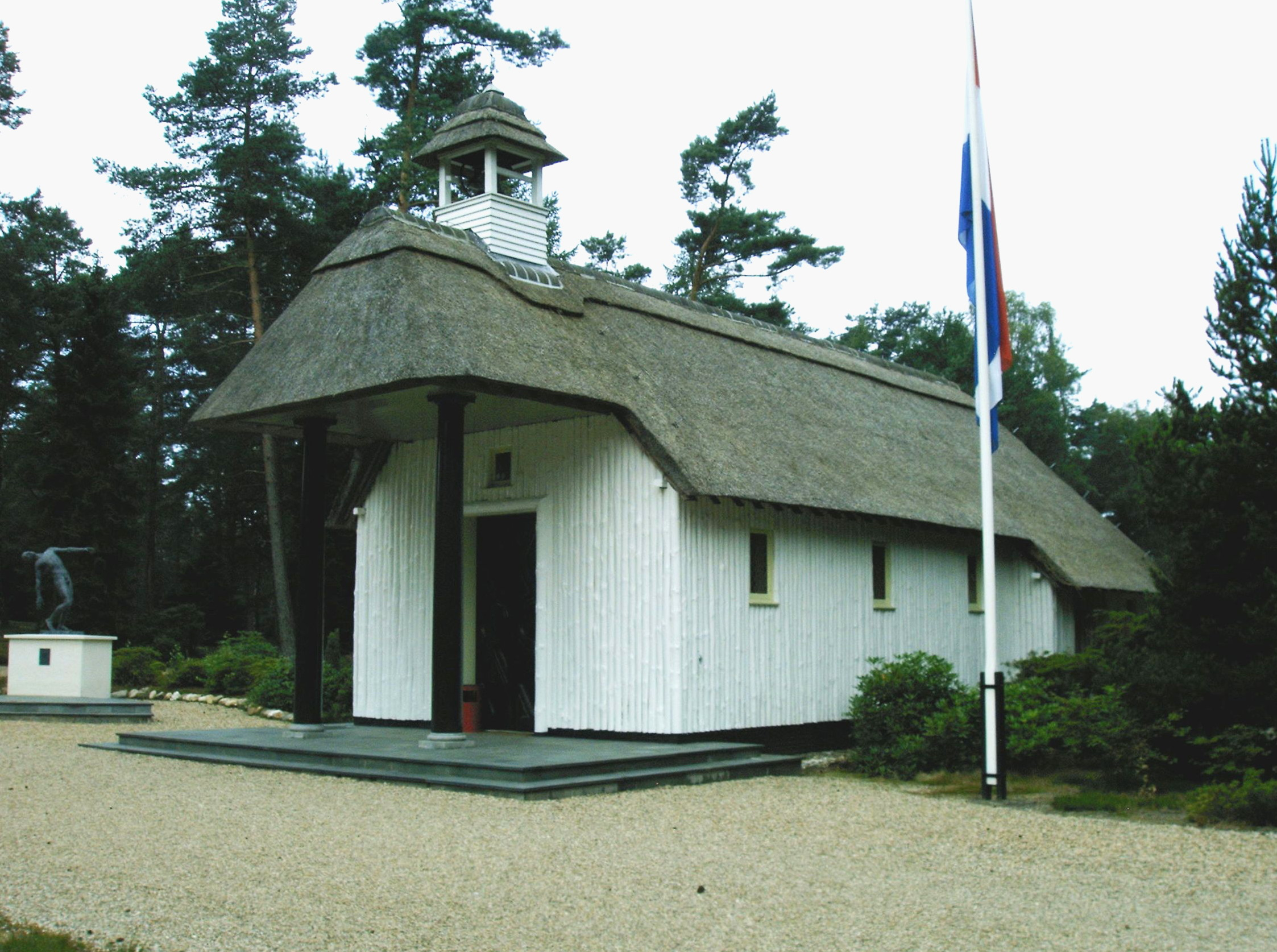 Ereveld Loenen, Kapel